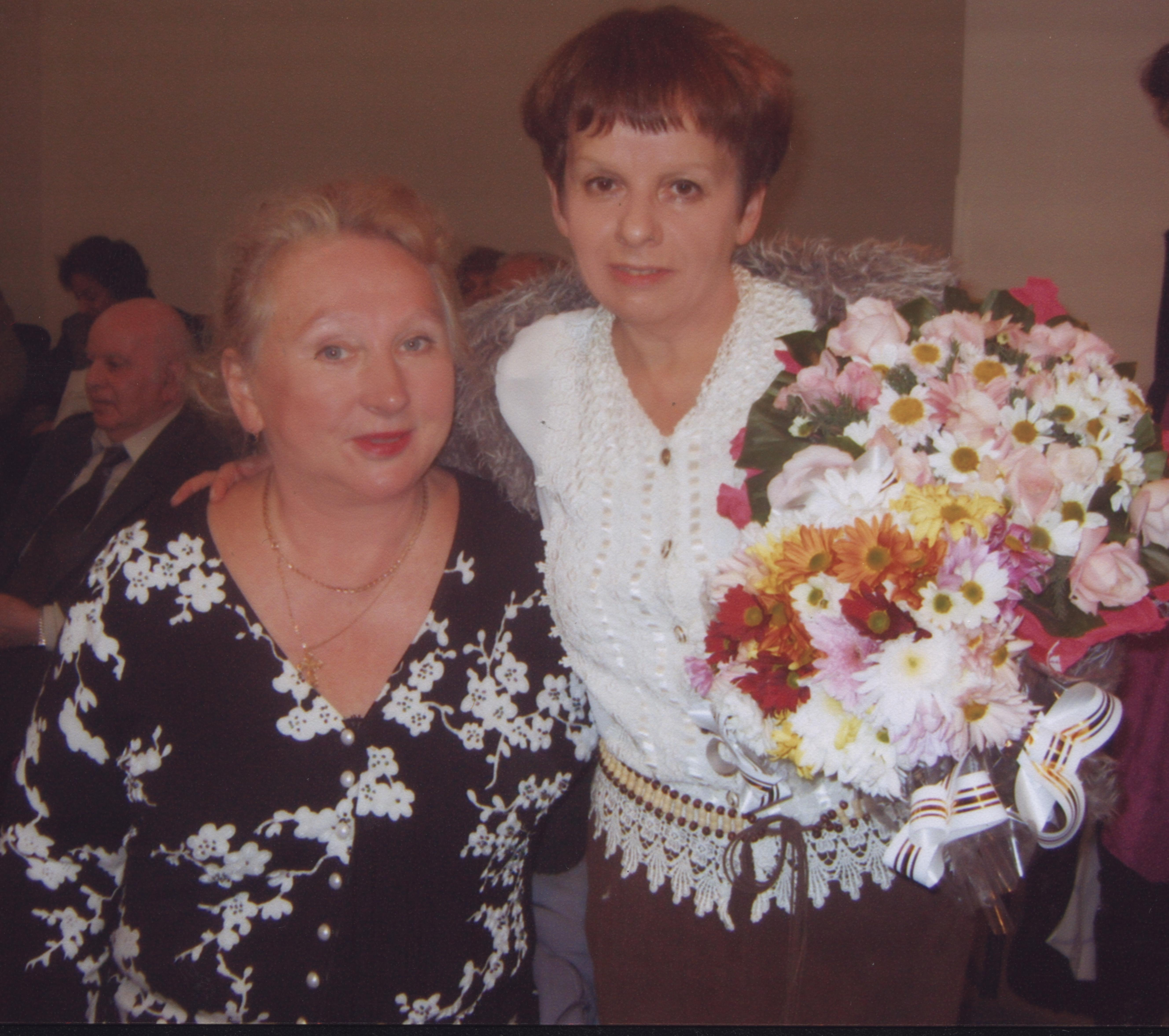 с М.В.Смирновой после защиты докторской диссертации, Ереван, 2009